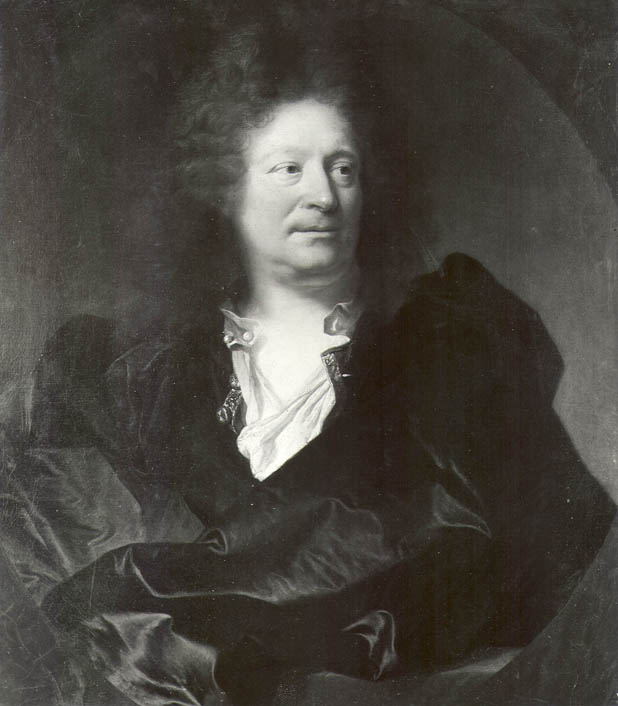 Portrait de François Girardon, sculpteur